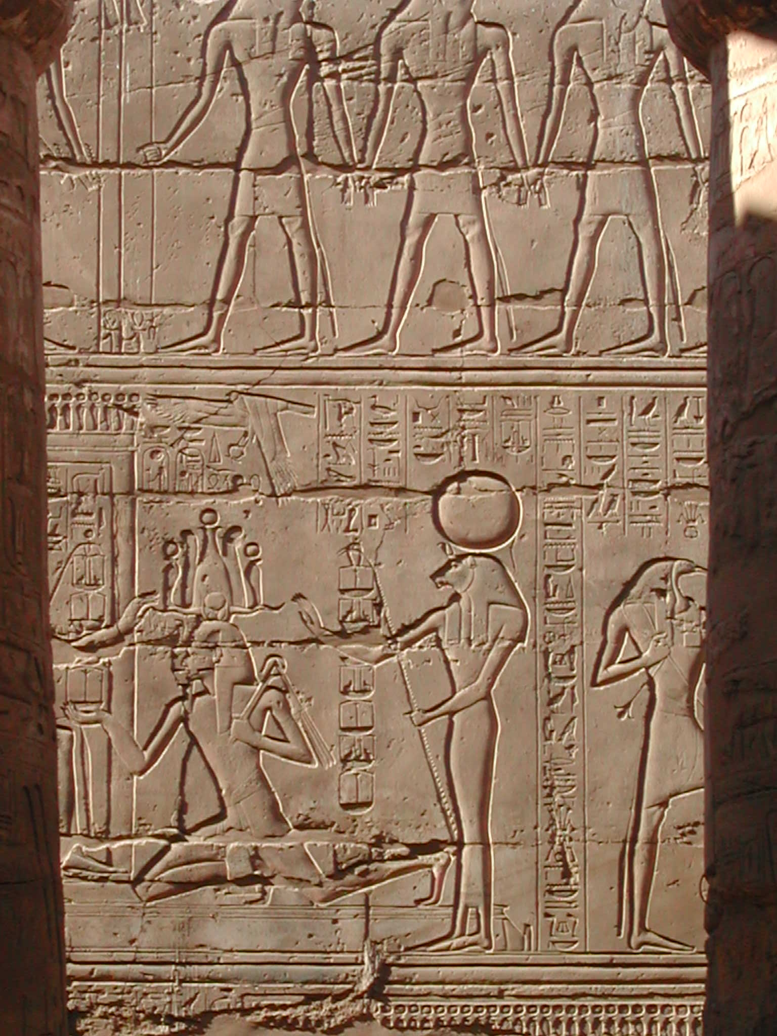 Papyrus-Kapitel_op_enger_Seil